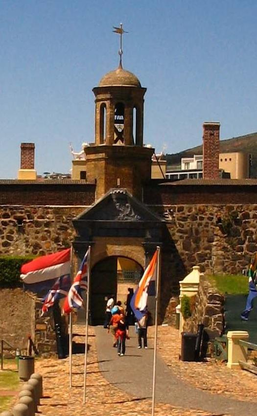 Hoofdingang van Kasteel de Goede Hoop, Kaapstad. detail